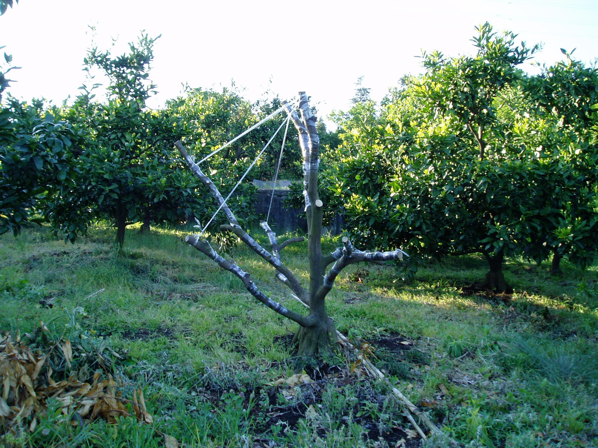 大津式一挙更新腹接ぎ法をおこなった柑橘